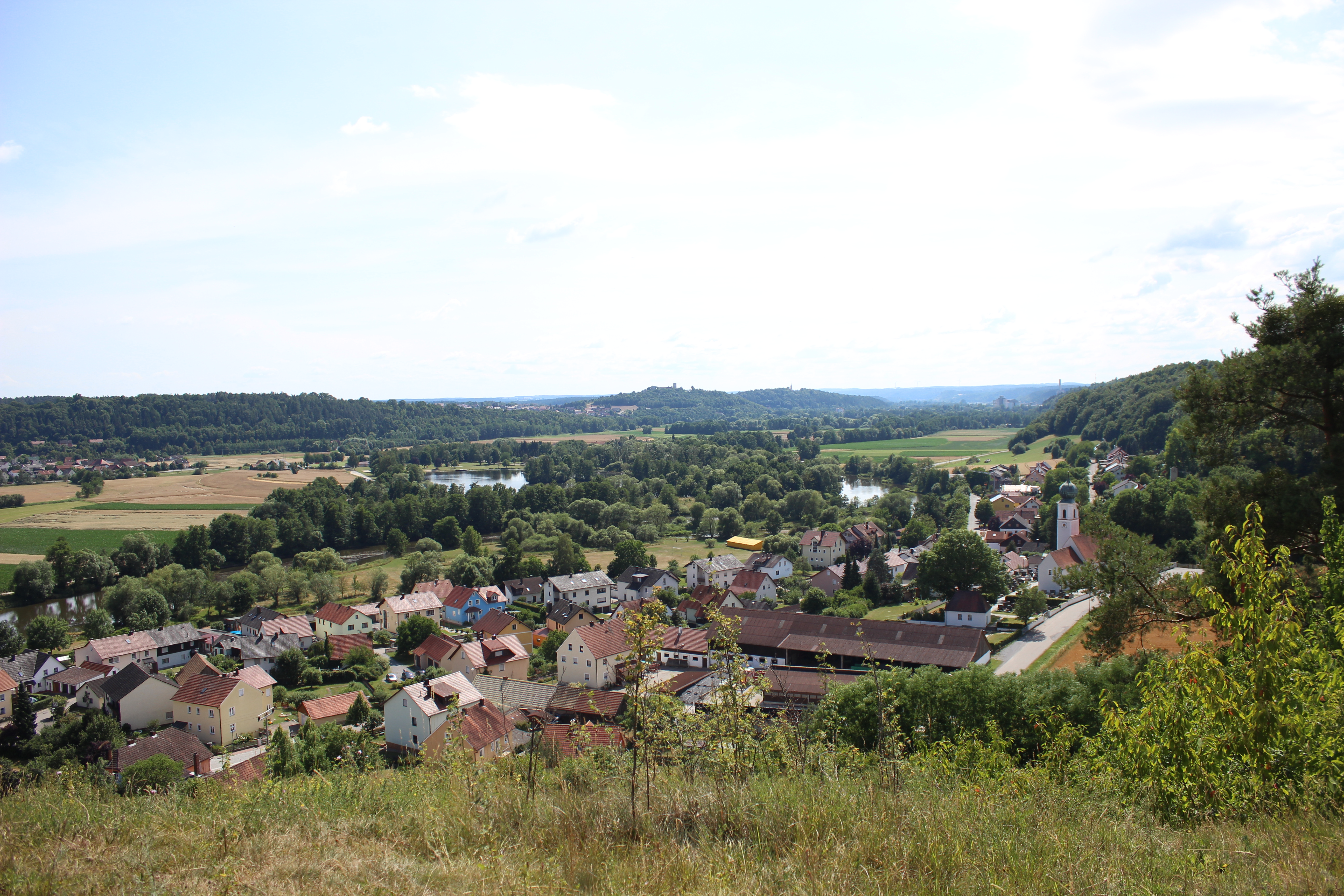 Das Bild zeigt das Obere Naabtal mit der Naab und dem Saltendorfer Weiher. Die Stadt im Vordergrund ist der Ortsteil von Teublitz Premberg. Im Hintergrund kann man den Burgberg und die Burg von Burglengenfeld erkennen.